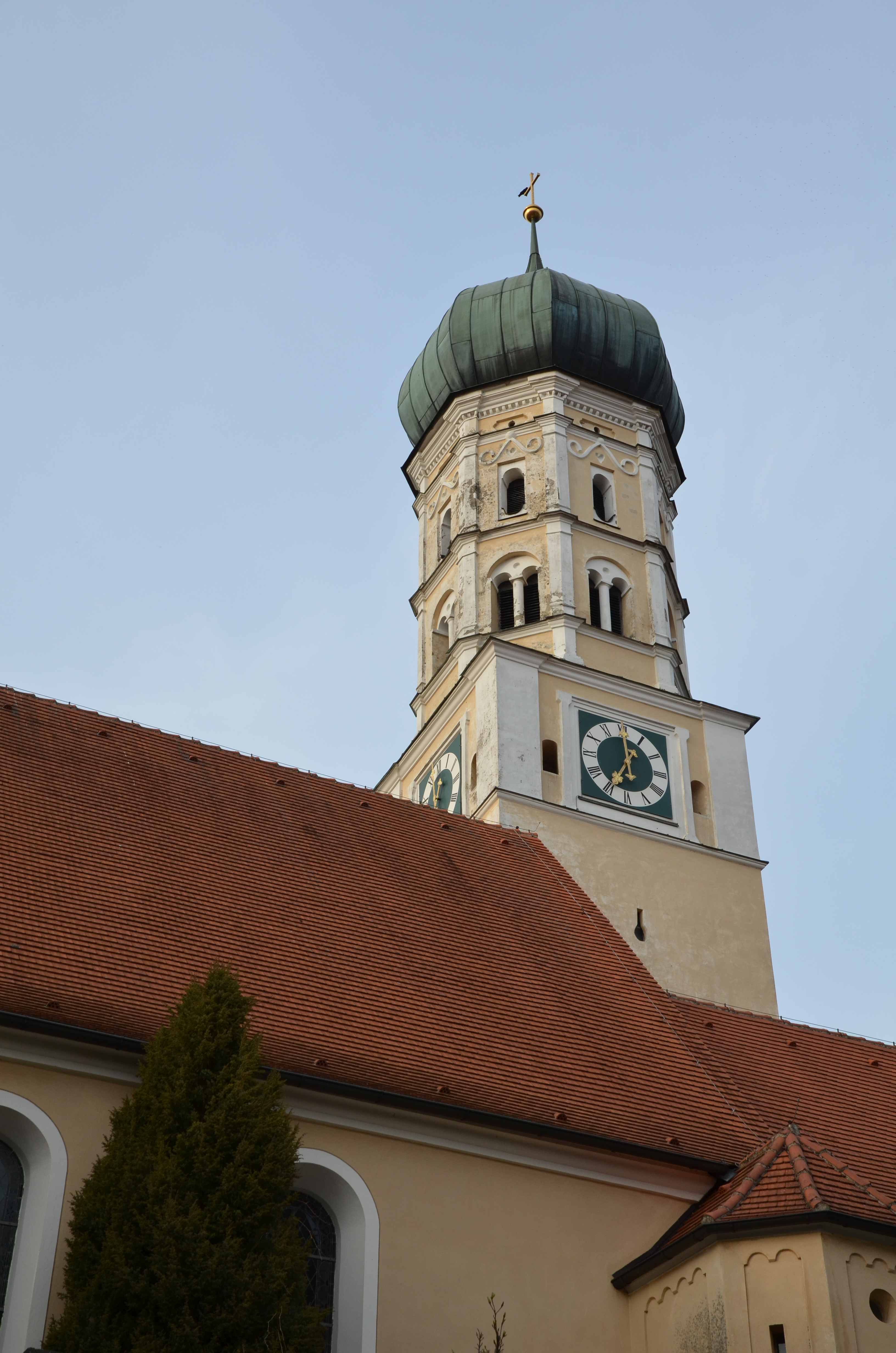 evang.-luth. Johanneskirche in Burtenbach